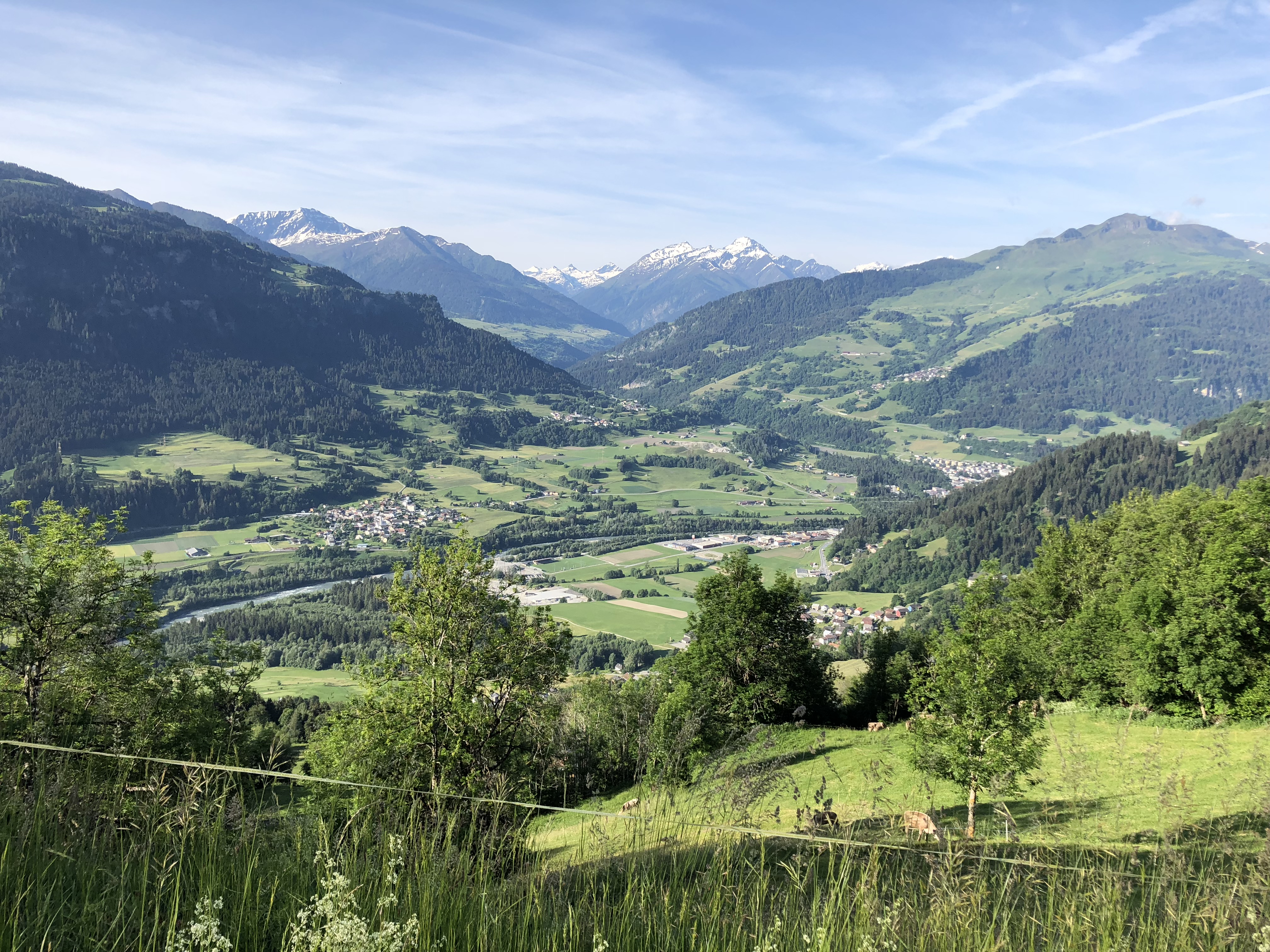 Die Surselva bei Ilanz; links Castrisch